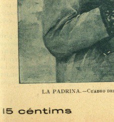 Detall amb el preu de la portada de Catalunya artística; núm. 099 de la 1a època del 8 maig 1902.